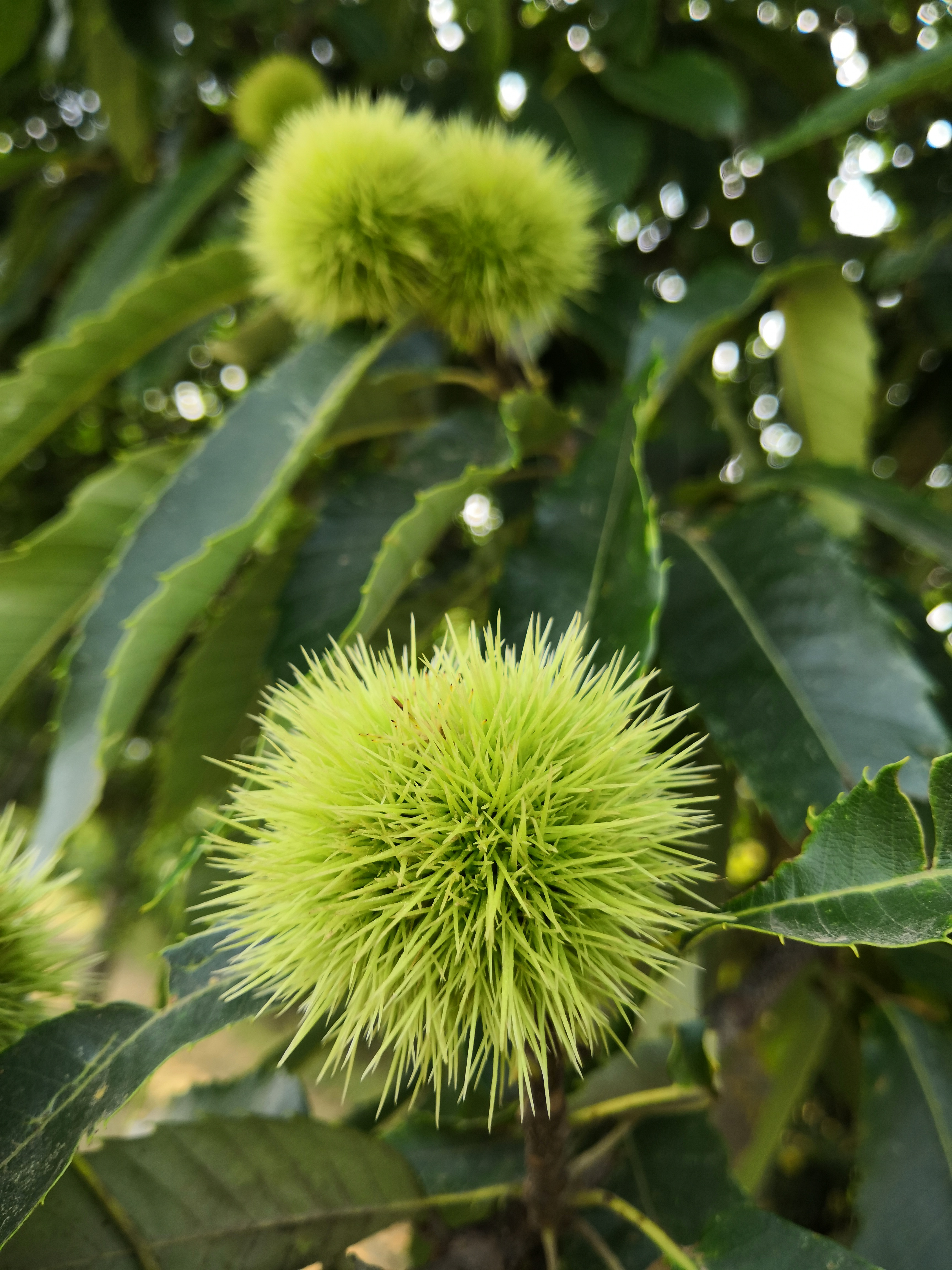 Edelkastanie in der Südpfalz in Herxheim bei Landau, Esskastanie, Castanea sativa, Maronen